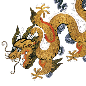 Yksityiskohta silkkiviitasta, 1800-luku, Kiina.